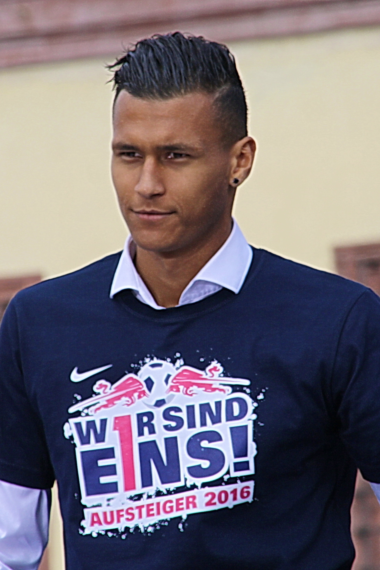 Davie Selke bei der Aufstiegsfeier von RB Leipzig 2016